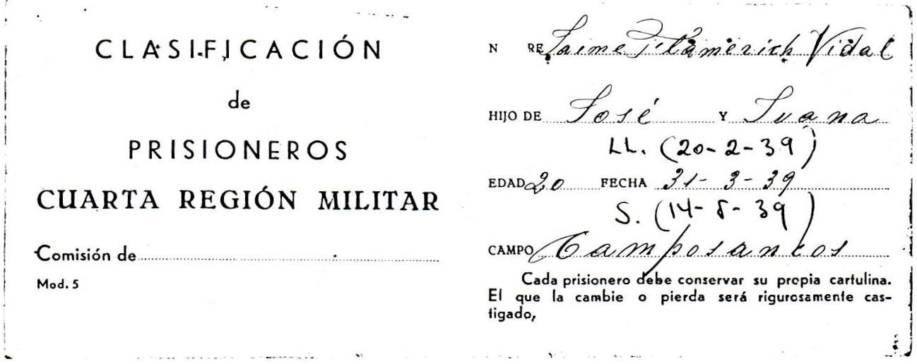 CLASIFICACIÓNdePRISIONEROS CUARTA REGIÓN MILITAR Comisión de ......... Mod. 5 NOMBRE ...Jaime Flamerich Vidal... HIJO DE ...José... Y ...Juana... LL. (20-2-39) EDAD ...20... FECHA ...31-3-39... S. (14-5-39) CAMPO ...Camposancos... Cada prisionero debe conservar su propia cartulina. El que la cambie o pierda será rigurosamente castigado